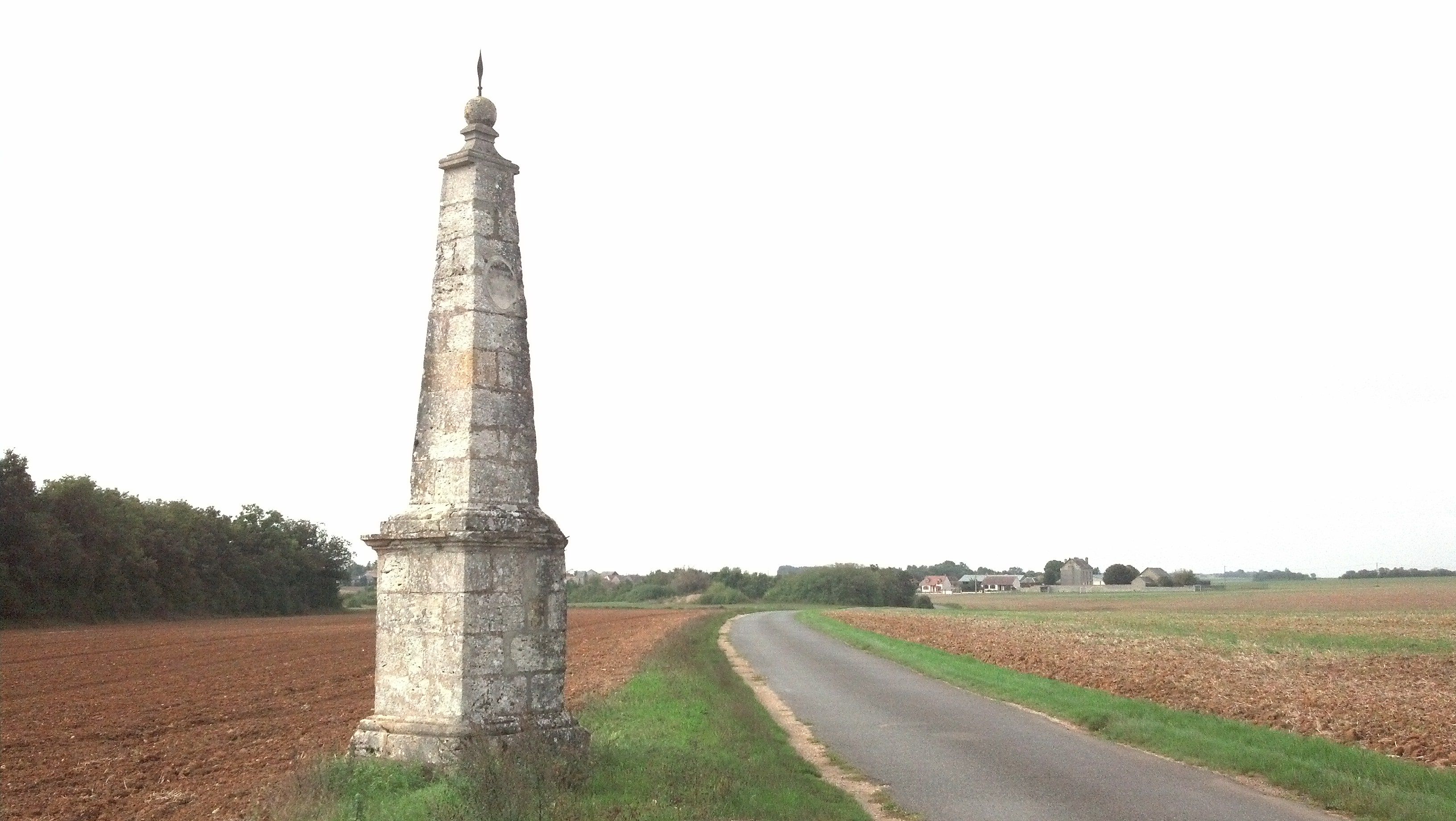 Obélisque astronomique d'Orveau-Bellesauve